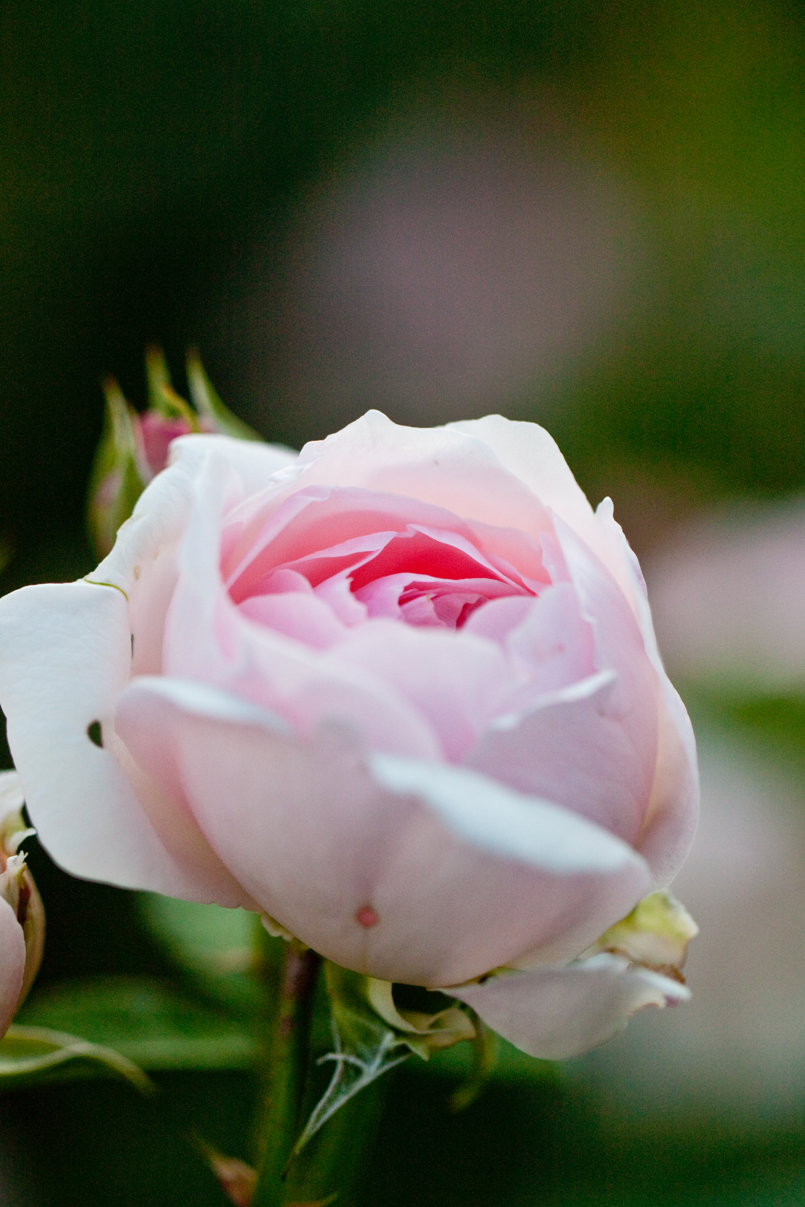 Masako (Eglantyne), マサコ。ご成婚にちなんで皇太子妃雅子様の名を冠したバラ。別名はエグランタイン。上品なピンク。